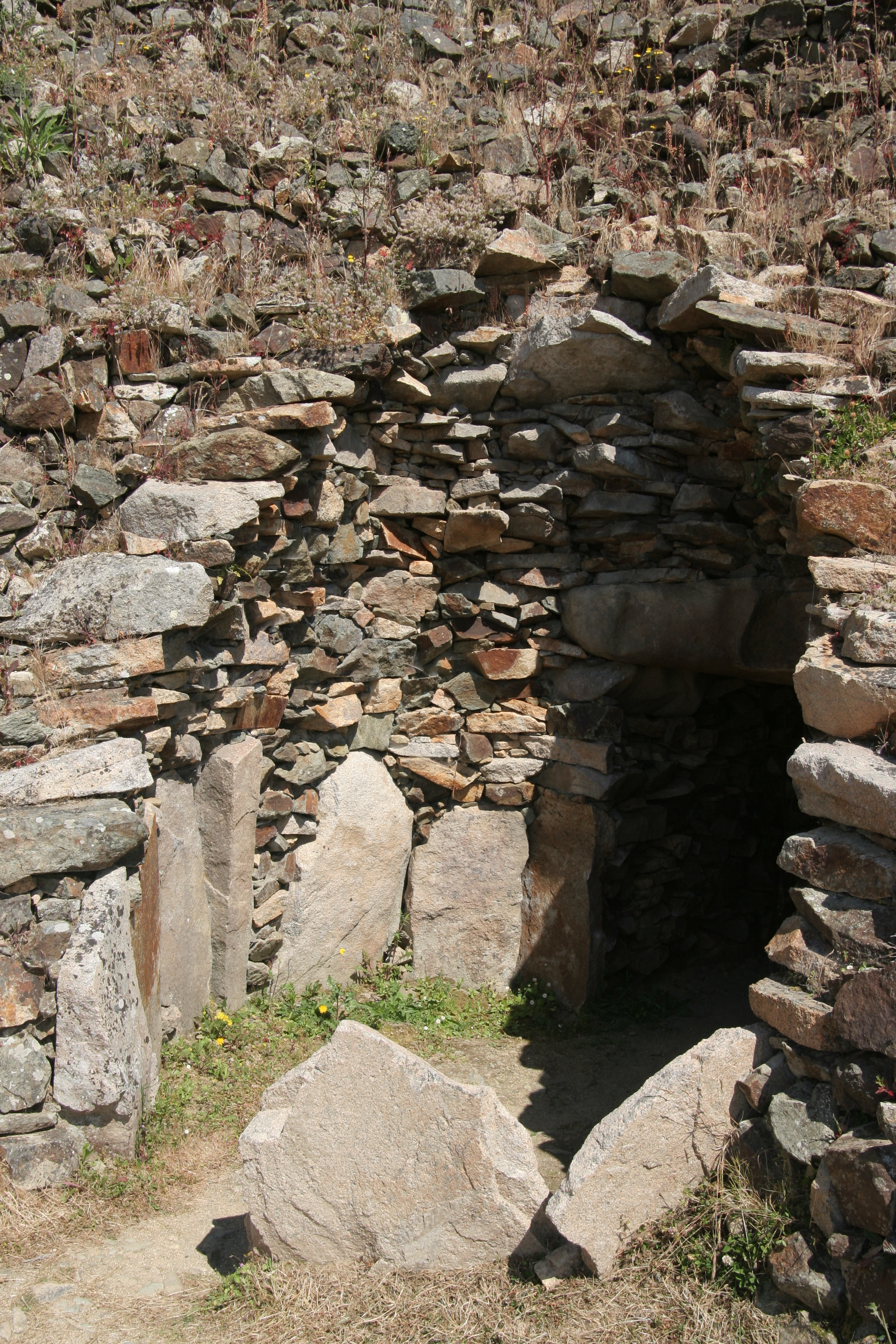 Cairn de Barnenez à Plouezoc'h.